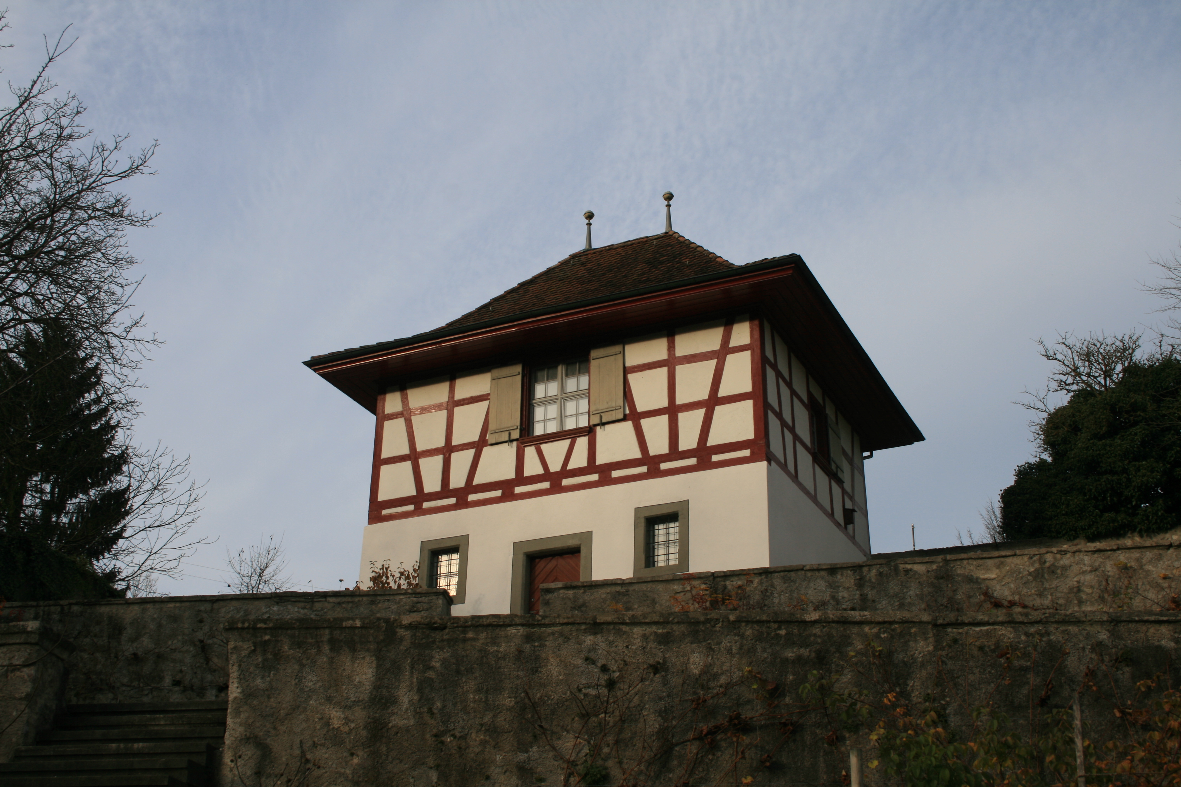 Lusthäuschen im Abtgarten (Kloster Wettingen)